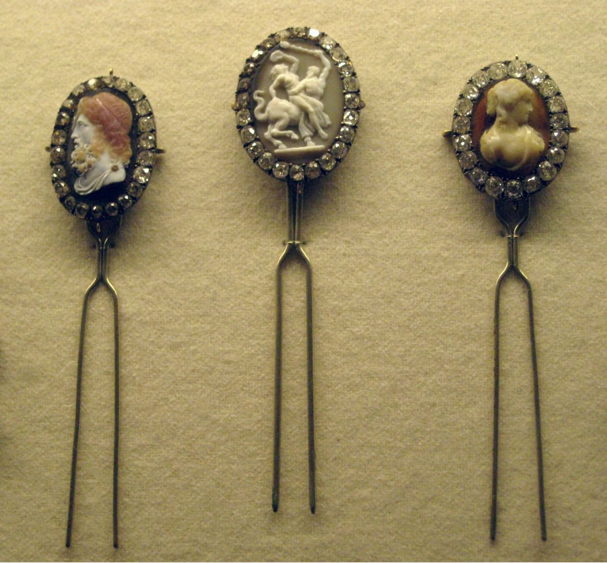 Hairpins. Шпильки